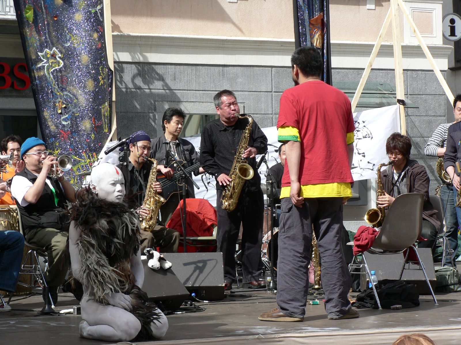 Shibusashirazu